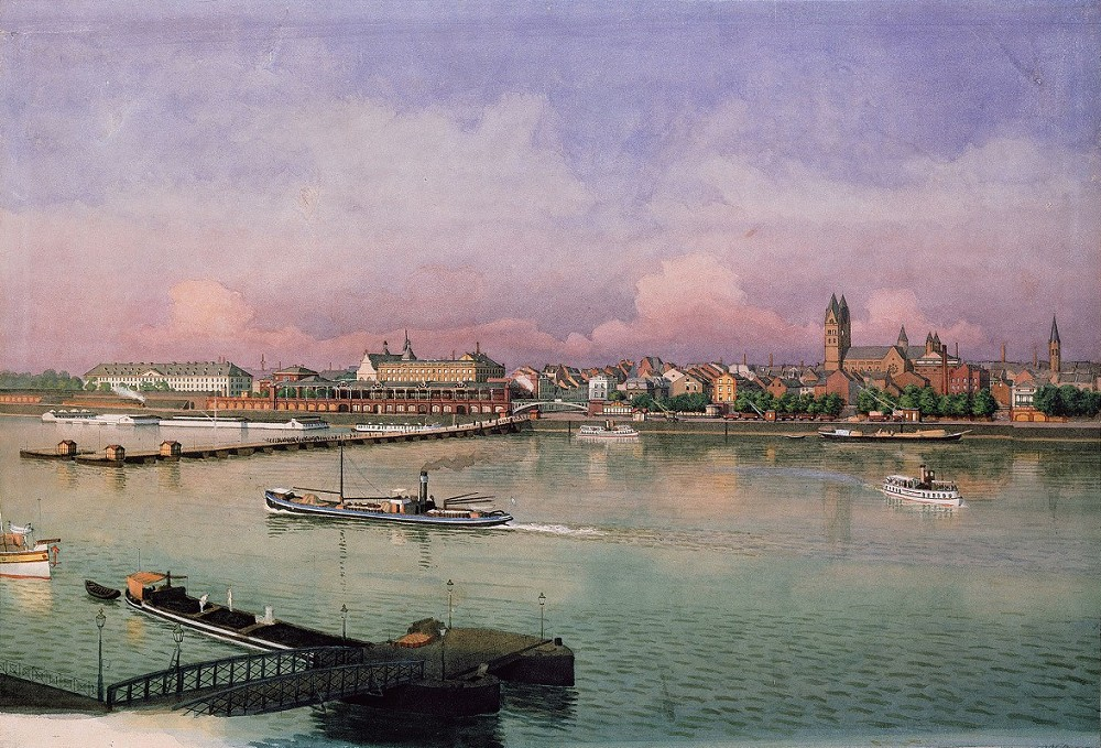 Wilhelm Scheiner: Ansicht von Deutz, Köln, um 1900, Aquarell, H: 42,5 cm, B: 63 cm, Inv.-Nr. HM 1923/17. 1922 Nachlass Wilhelm Scheiner, Erbe Dr. Hans Kruse, Siegen (Heimatforscher, 1911–1941 Leiter des Siegerlandmuseums und mit Scheiner befreundet) – 1923 von Kruse mit vier weiteren Aquarellen an das Historische Museum verkauft.